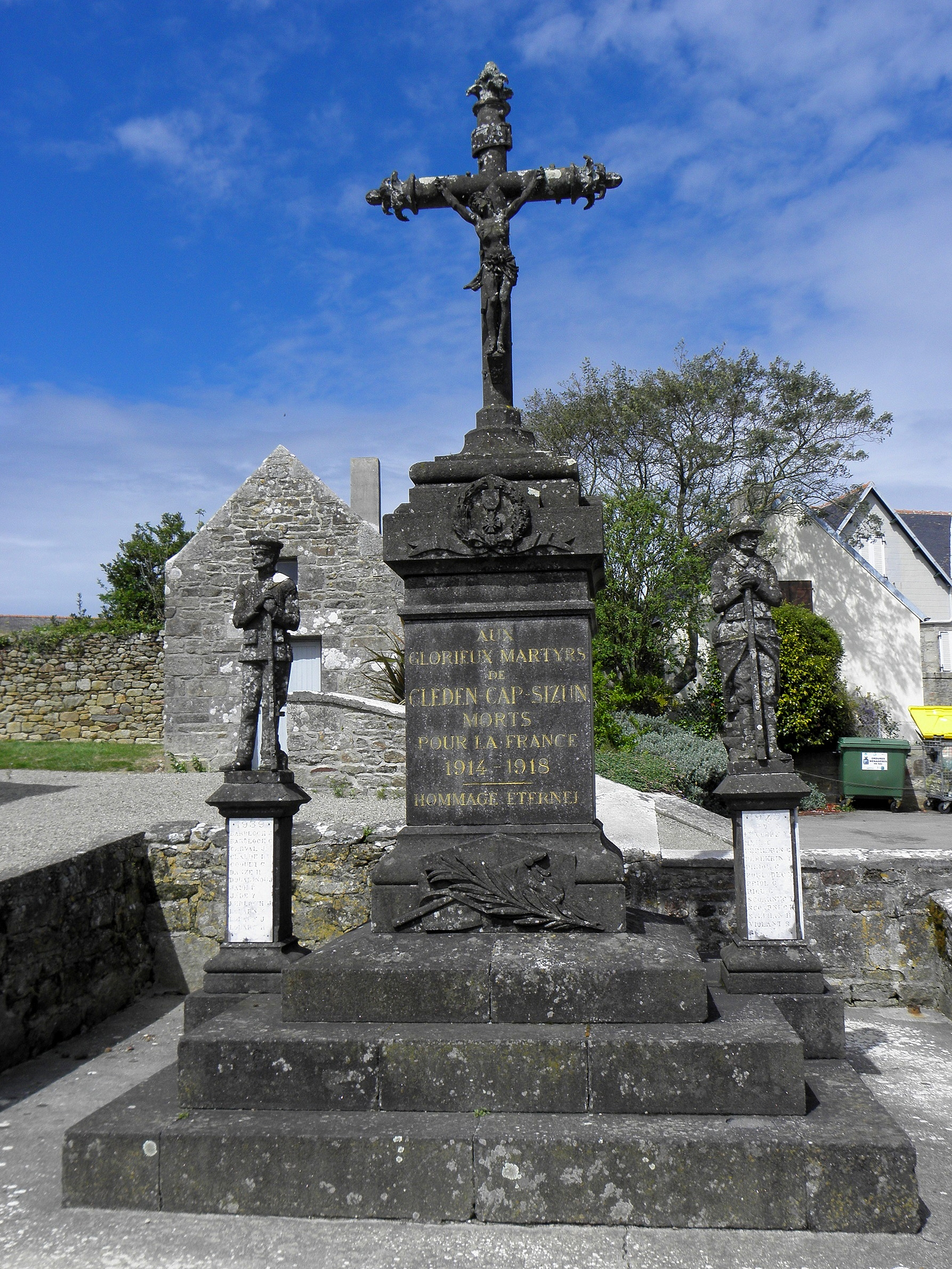 Monument aux morts de Cléden-Cap-Sizun (29).